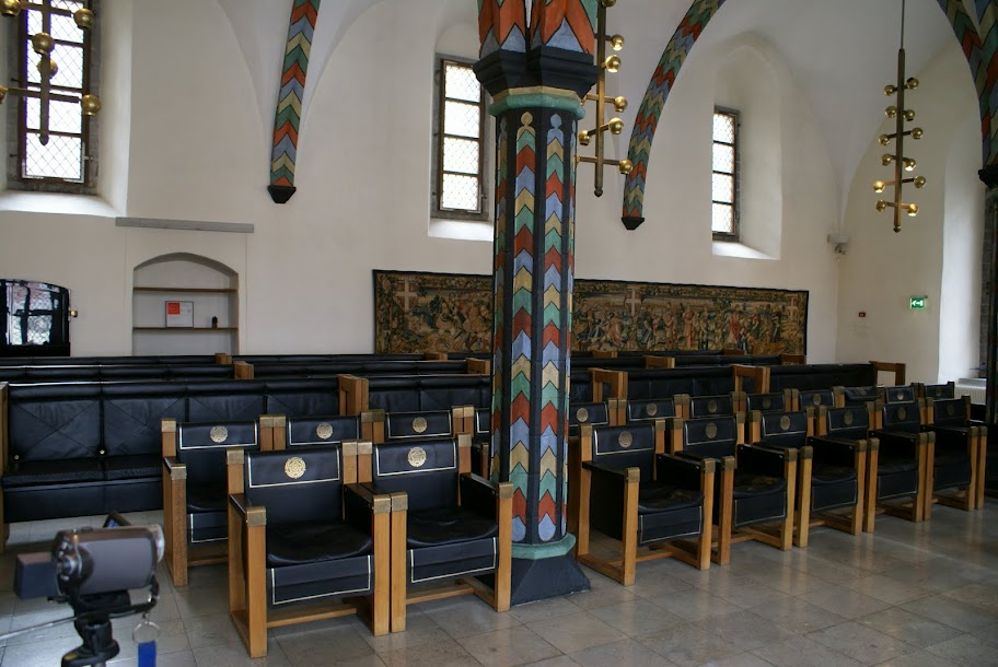 Tallinna raekoja kodanikesaal